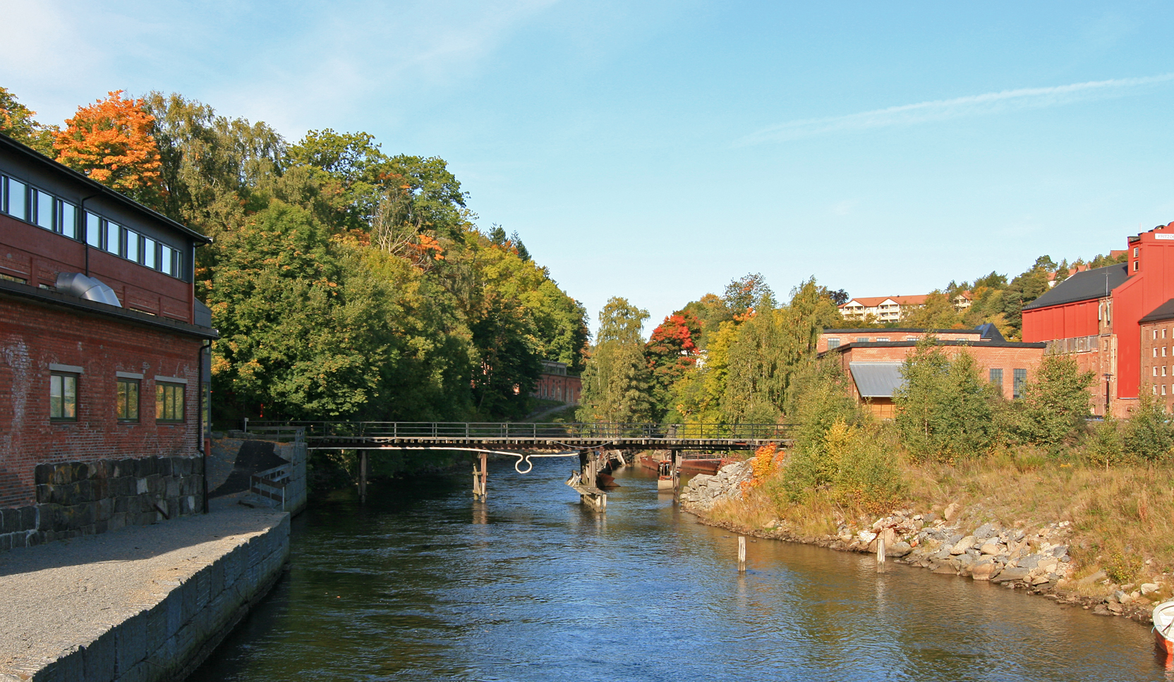 Farriselva, Larvik, Vestfold, Norway.